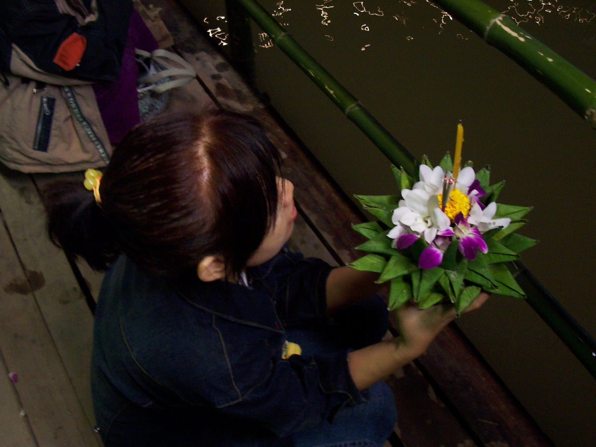 Loy Krathong (ลอยกระทง) (อำเภอห้วยคต จังหวัดอุทัยธานี) (Amphoe Huaikhot, Uthai Thani, Thailand)